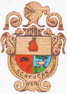 Stemma Acayucan Veracruz